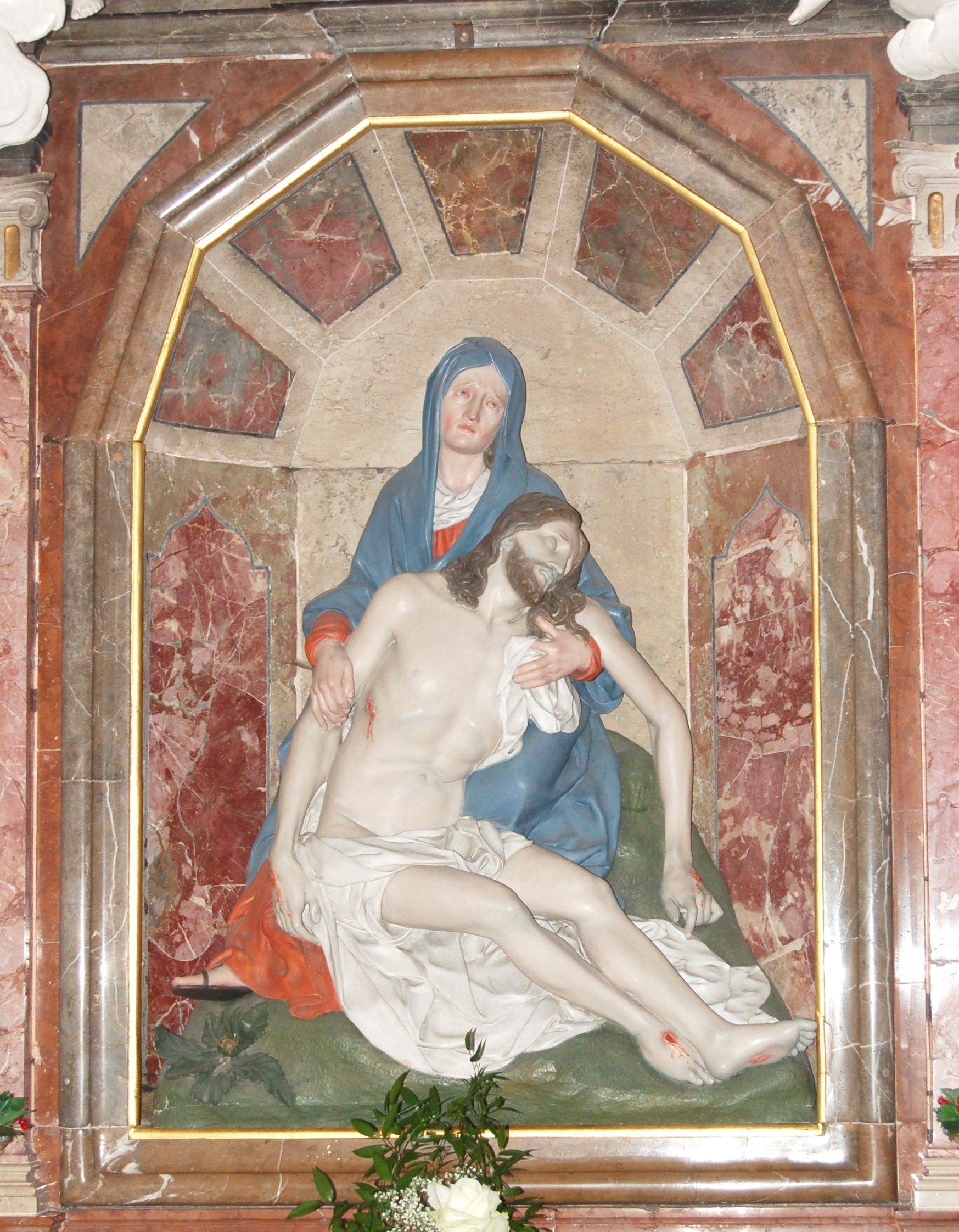 Pietà am linken Seitenaltar der St. Nikolauskirche Weitau bei St. Johann in Tirol von Joseph Haid